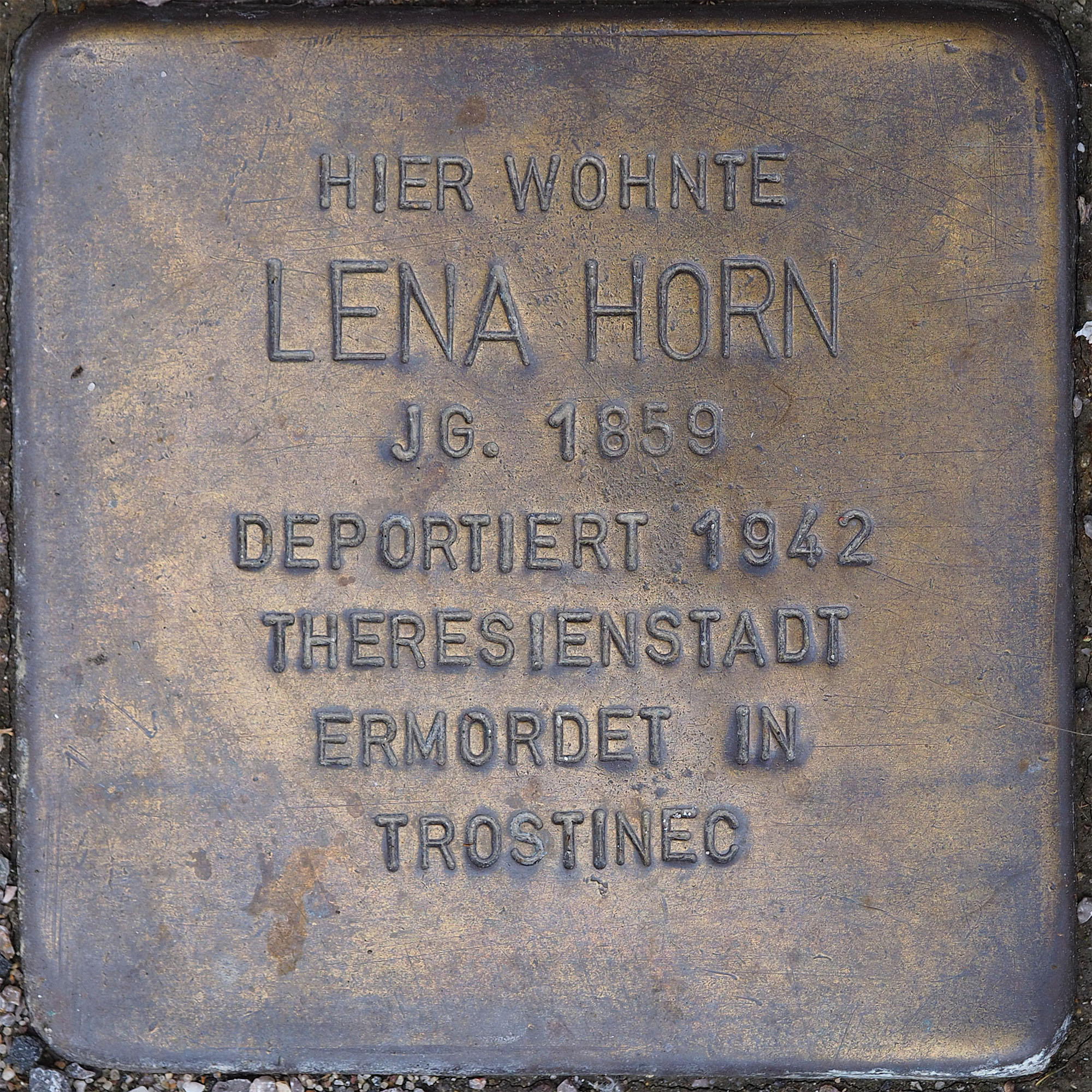 Stolpersteine MG: Horn, Lena